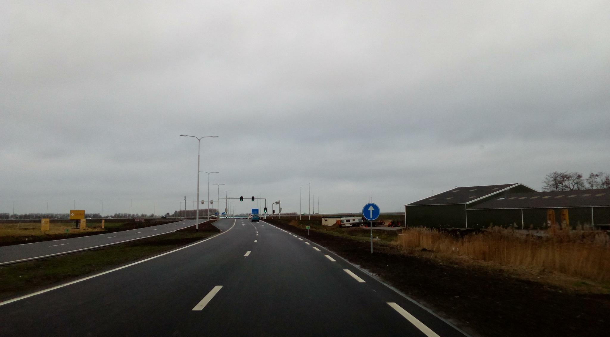 Moordrechtboog